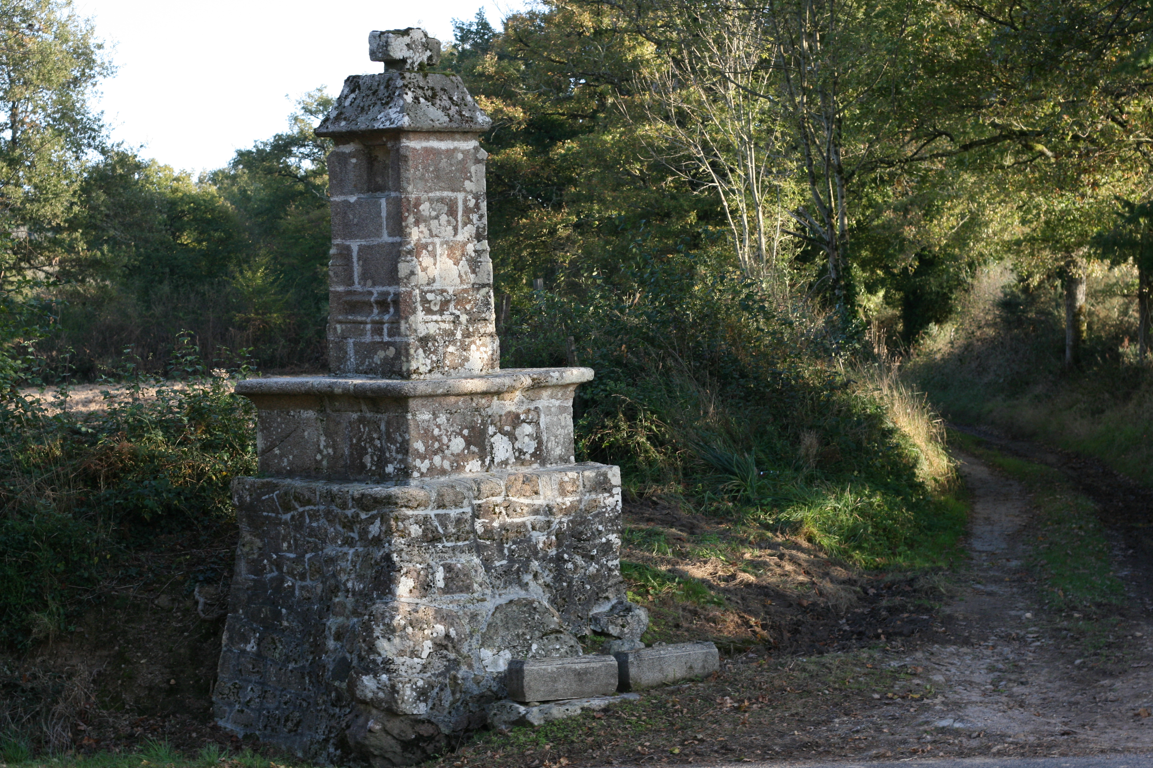 Croix de chemin,sur socle granitique imposant,située en face du cimetière,sur la route du Pic.